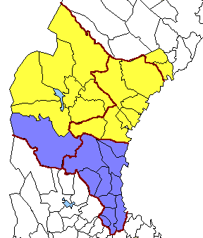 gamla indelningen av västernorrlands län